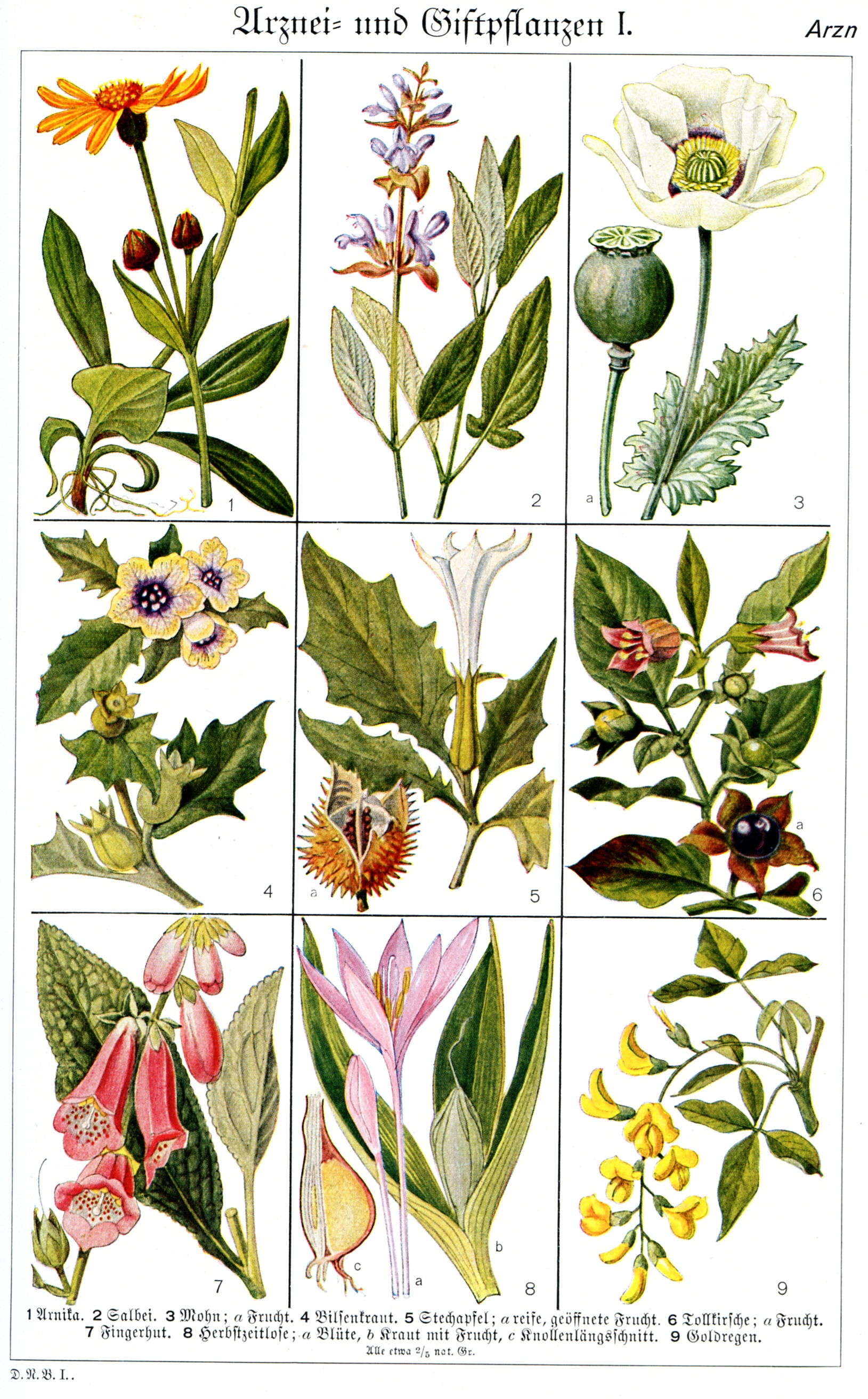 Healing plants: Arnika Arnica Salbei Salvia Mohn Papaver Bilsenkraut Stechapfel Tollkirsche Fingerhut Herbstzeitlose Goldregen